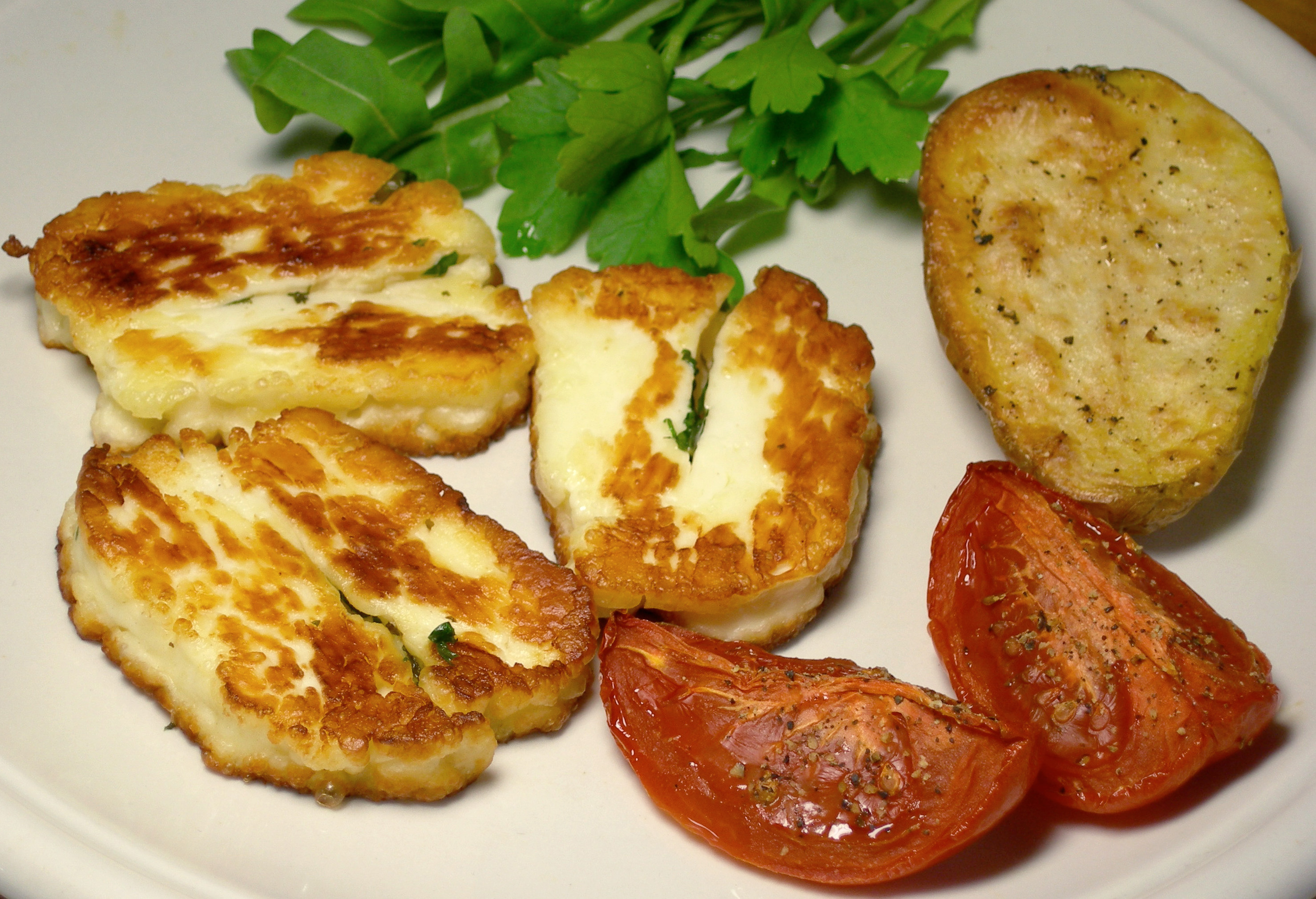 Halloumi, ein Käse aus Zypern, gebraten.